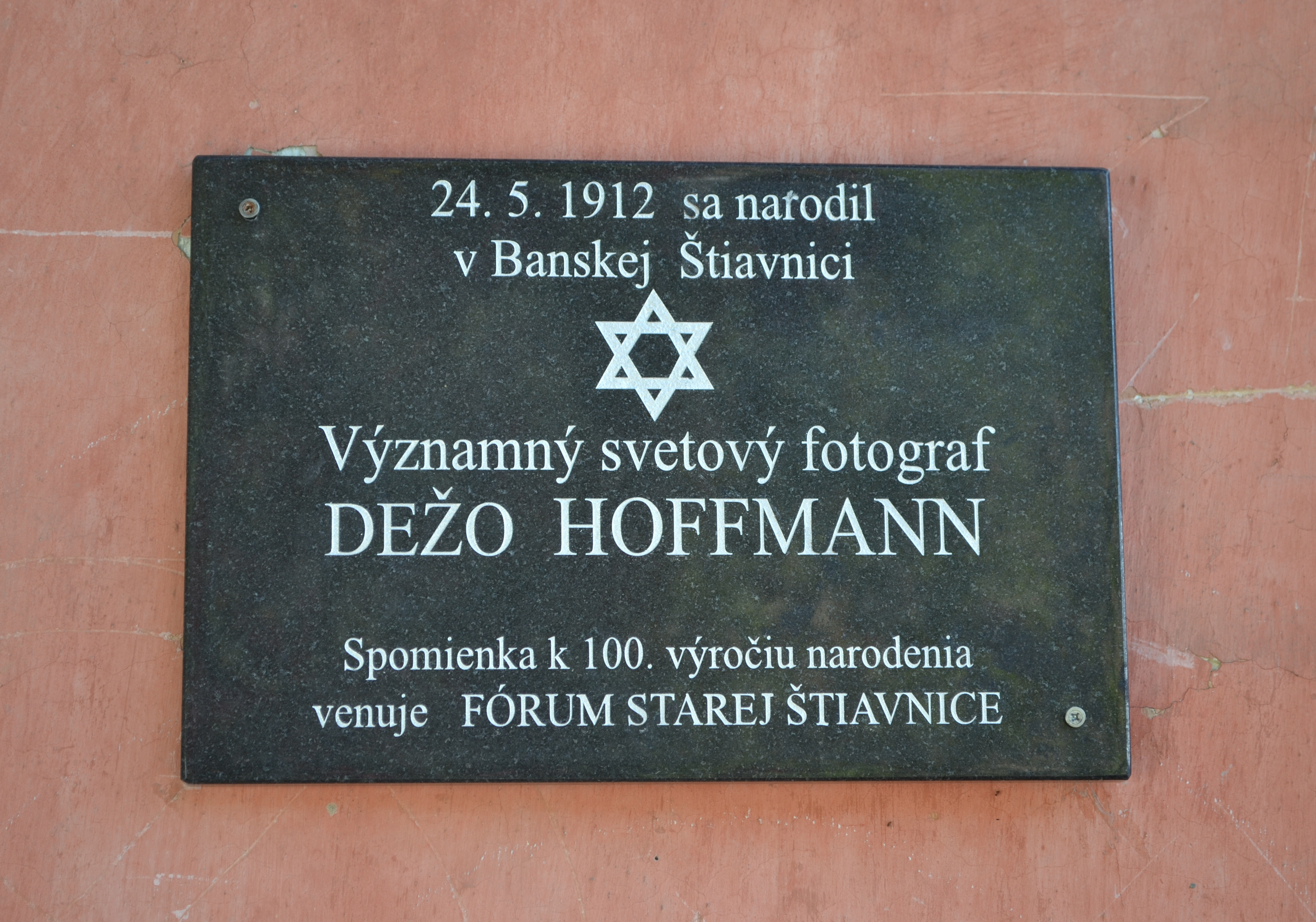 Pamätná tabuľa medzinárodne uznávaného slovenského fotografa Dezidera Hoffmanna na dome v ulici Pod Červenou studňou 10 v Banskej Štiavnici